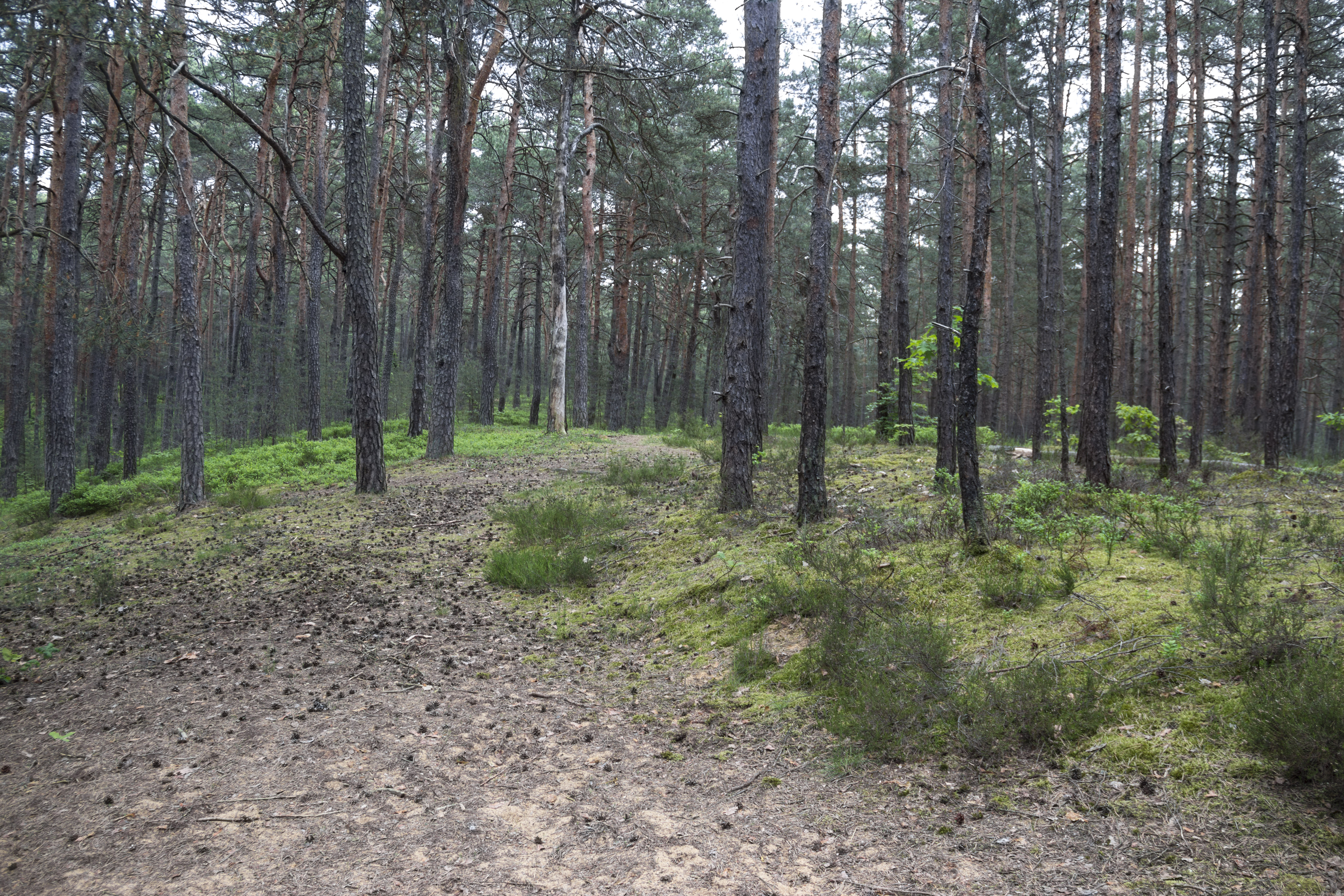 Naturschutzgebiet, Neumarkt in der Oberpfalz, Neumarkter Sanddünen